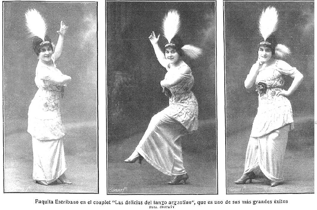 Paquita Escribano en el couplet "Las delicias del tango argentino" que es uno de sus grandes exitos